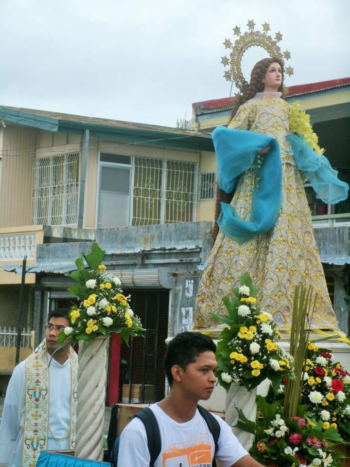 Winaray : Rebulto han Birhen Maria na gin sundan han Padi han singbahan